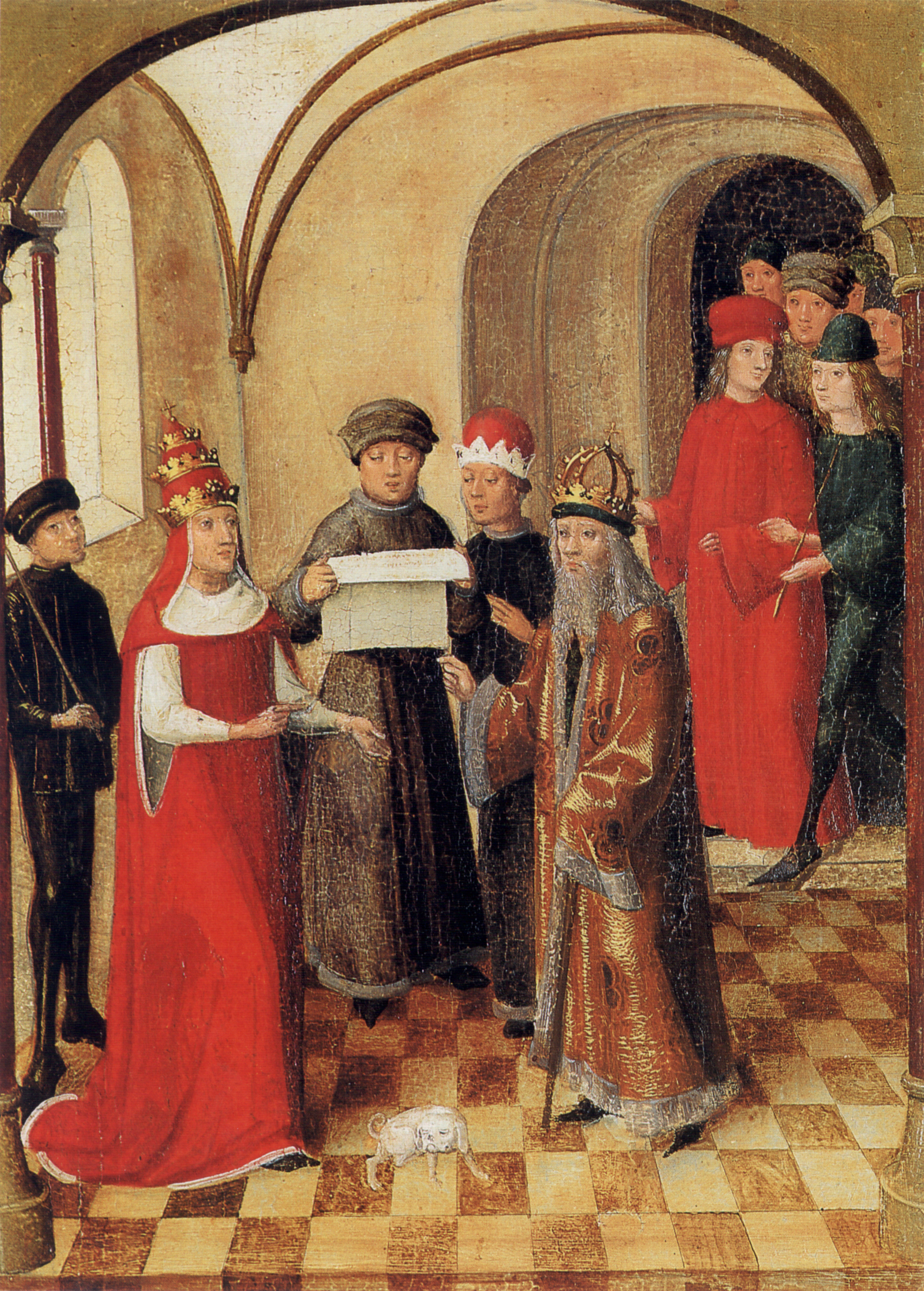 Weingartener Heilig-Blut-Tafel von 1489. Landesmuseum Württemberg, Stuttgart. Tafel 12: Der Kaiser teilt die Kunde dem Papst und dem Herzog Bonifaz von Mantua mit (ahistorisch, nach der Legende im Jahr 1048)